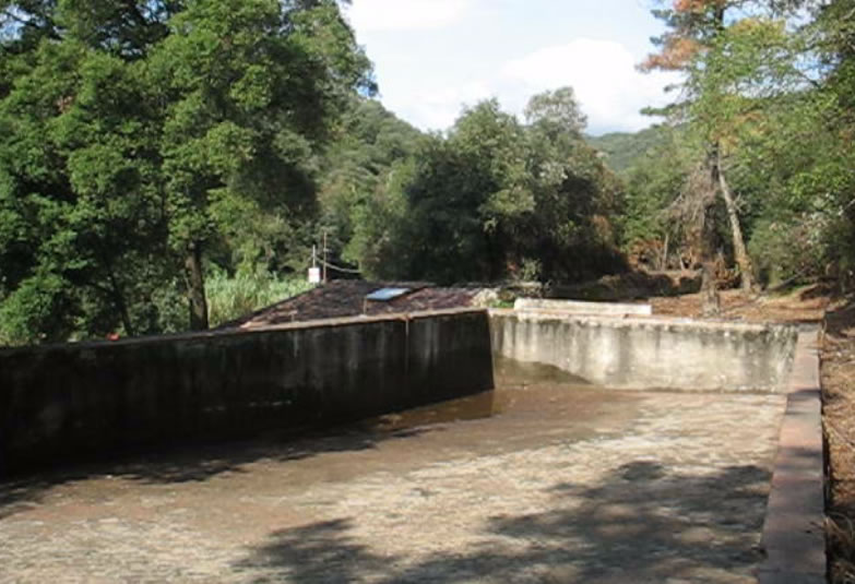 Bassa del molí fariner de Can Marquès a Pineda de Mar, Maresme, Catalunya.